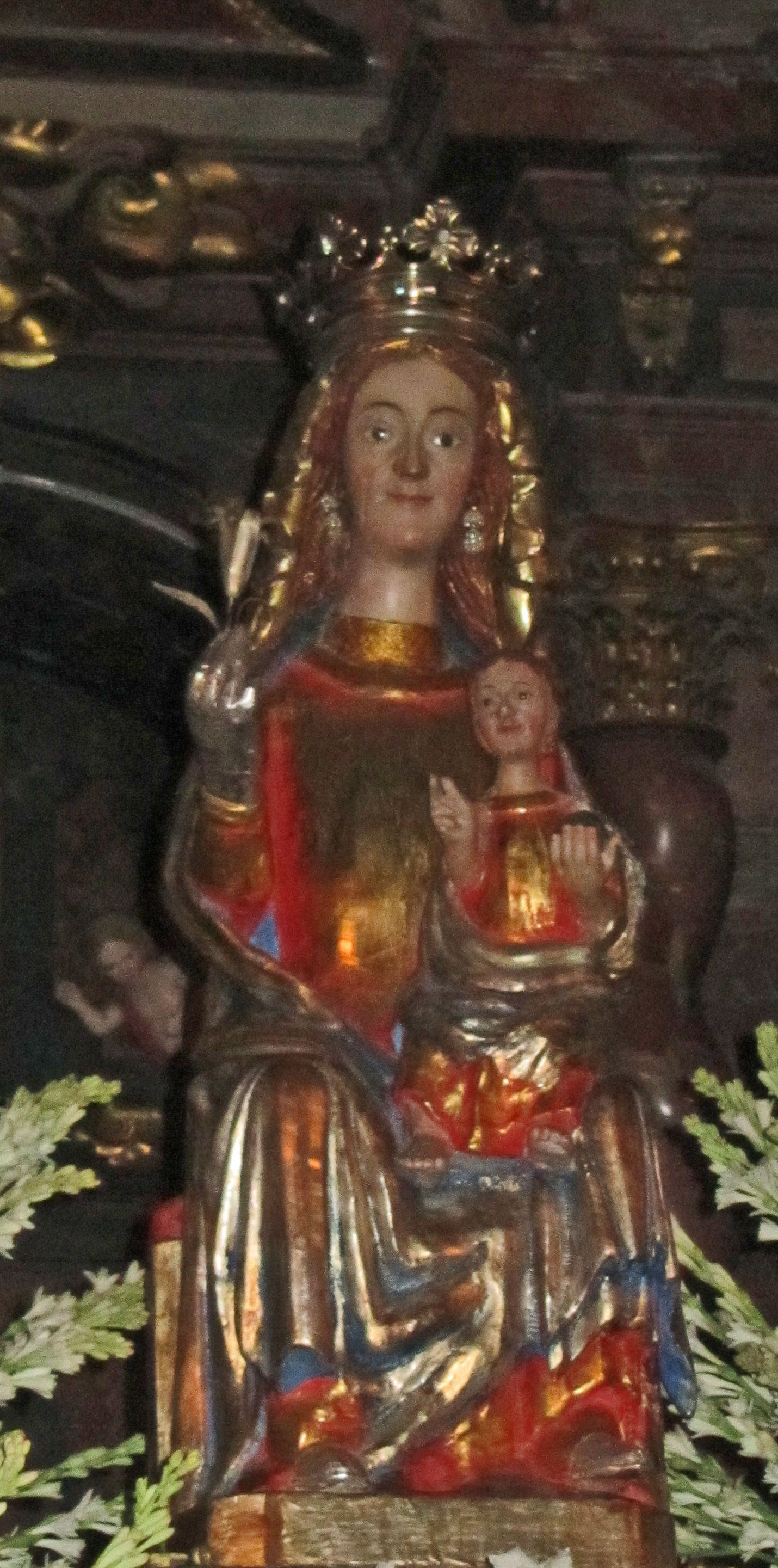 Imagen románica del siglo XII de Santa María la Mayor en la catedral de Sigüenza (Spain)